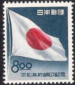 連合国に対する日本の平和条約調印記念の8円切手。描かれているのは日章旗である。